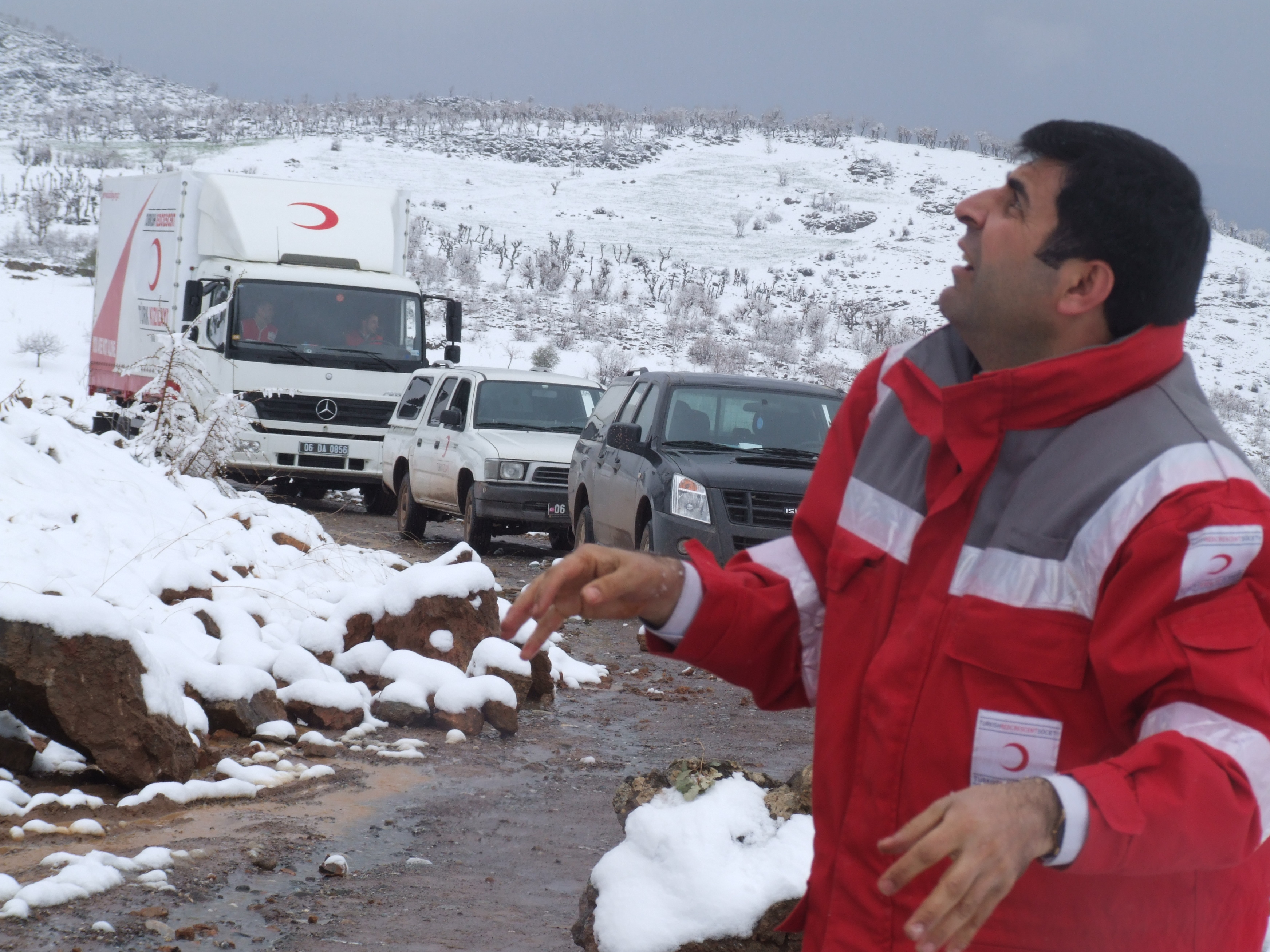 Siirt Kızılay Derneği